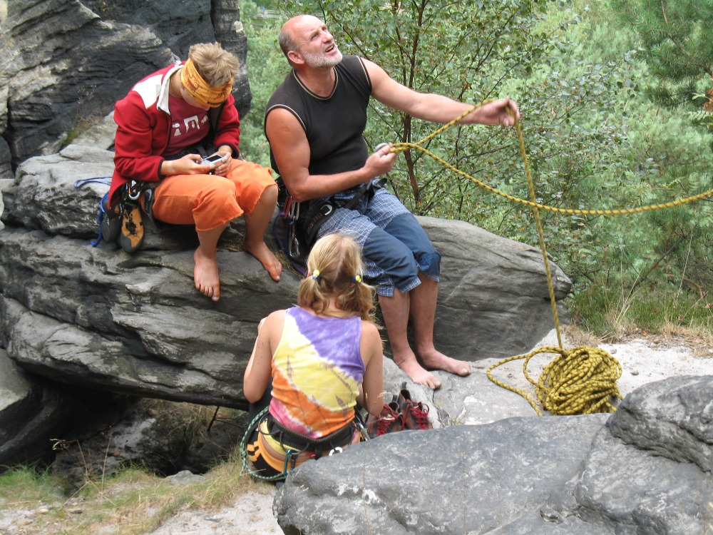 Joska Rybička během letní horoškoly v Ostrově